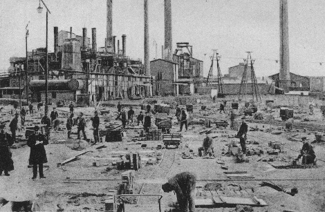 Krughuette near Eisleben